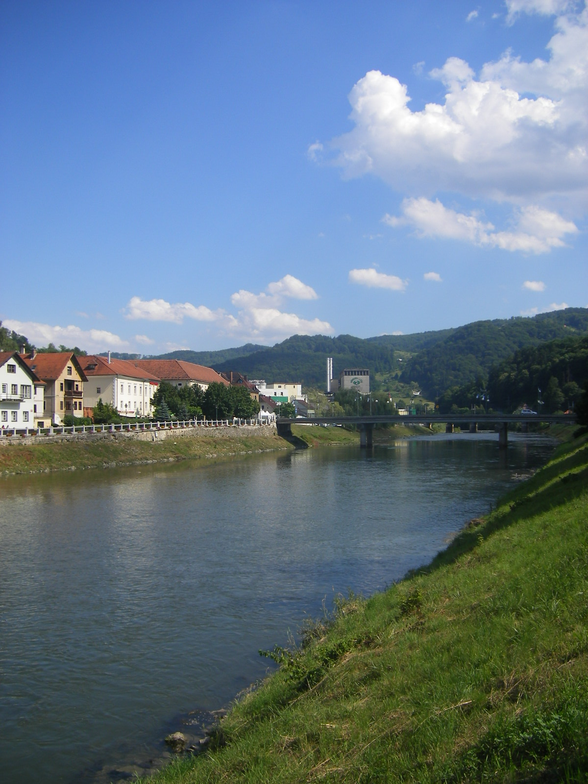 Laško - Savinja River. Far behind is the Laško Brewery (Pivovarna Laško).